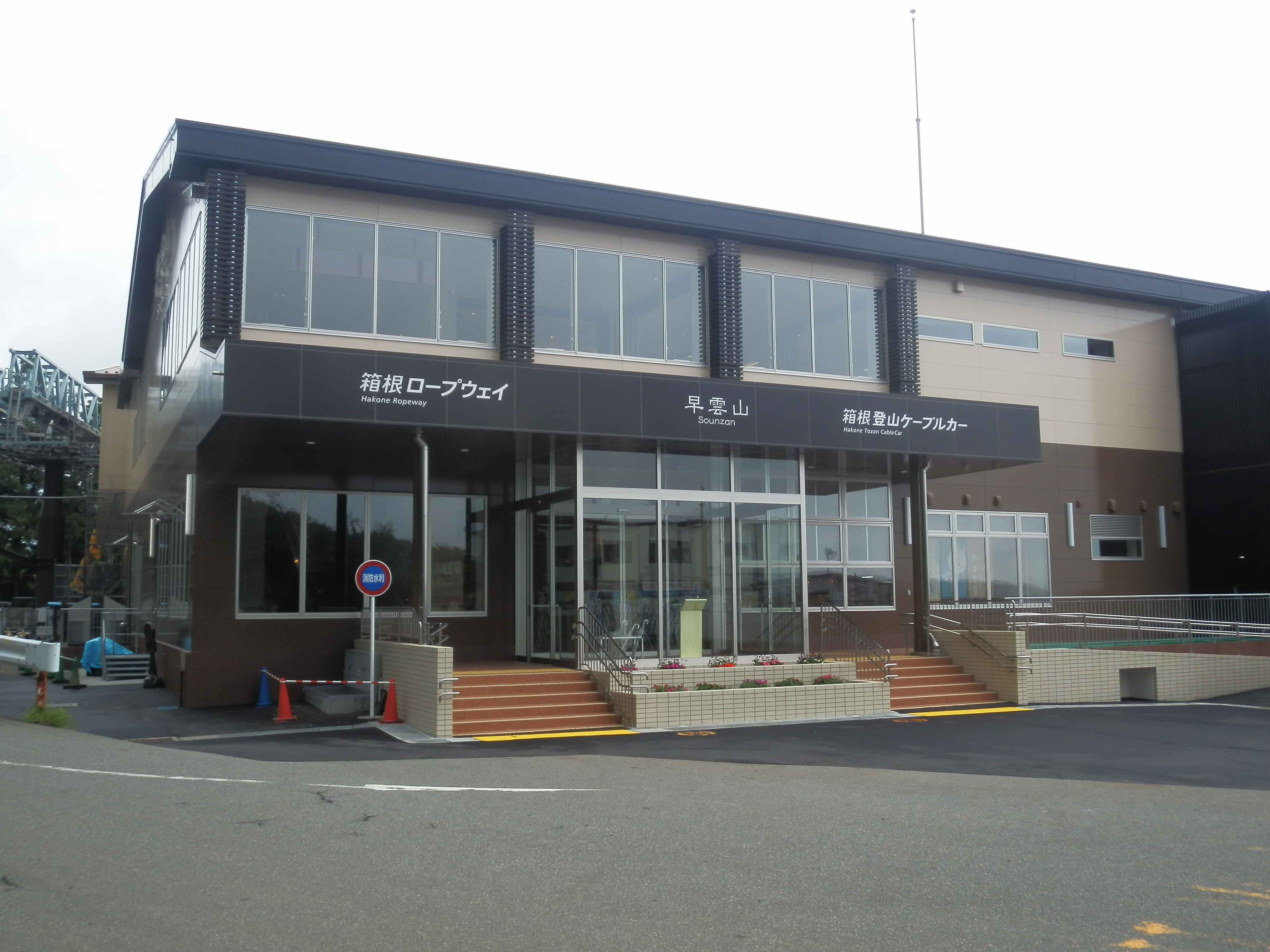 早雲山駅（建て替え後）